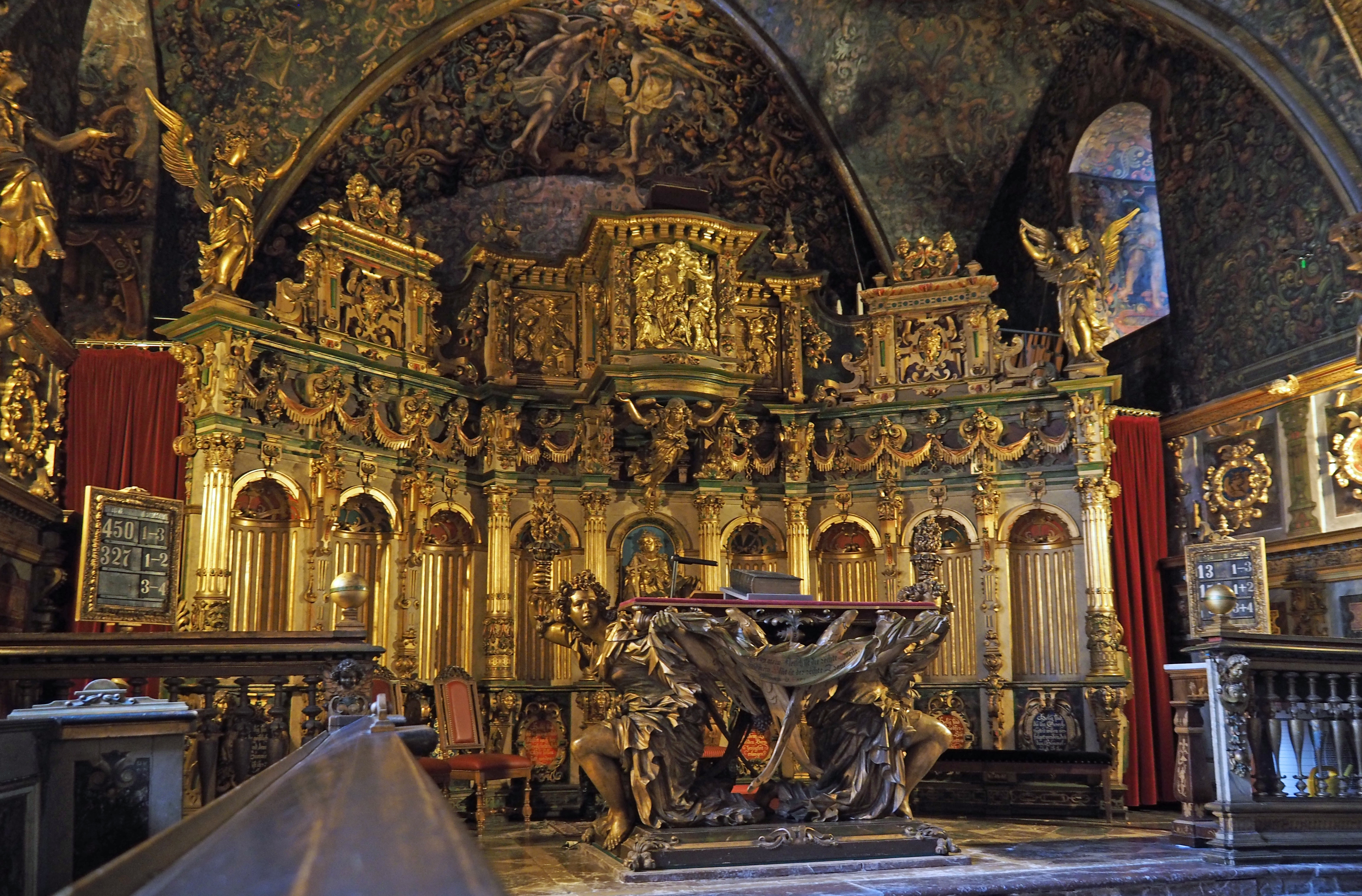 Innenraum der Schlosskapelle Bückeburg